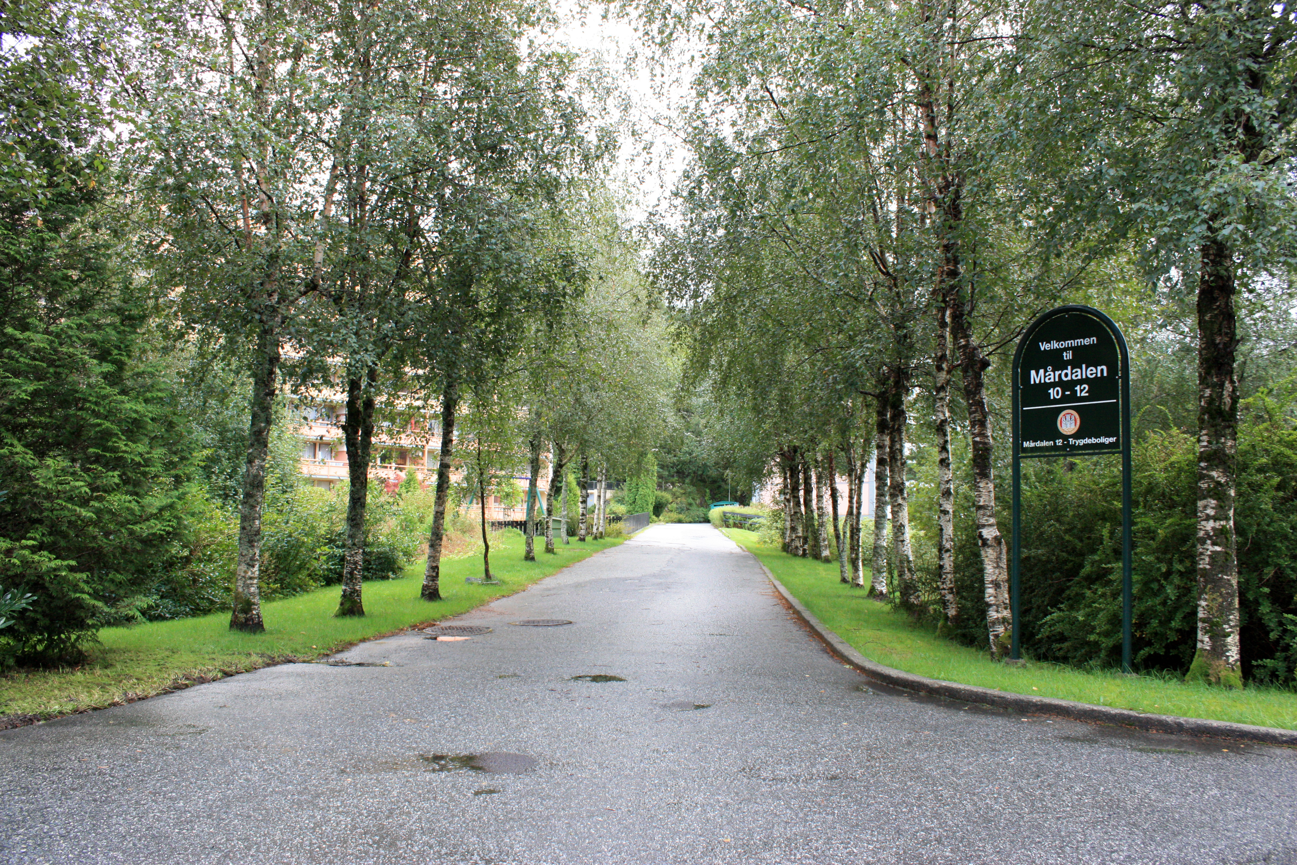 Mårdalen, Fana, Bergen.